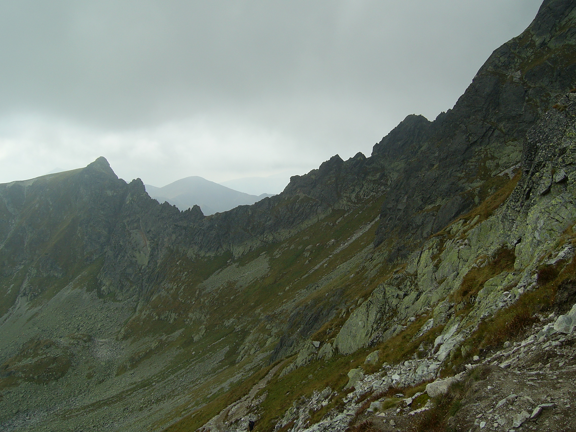 Walentkowa Grań z Zawratu